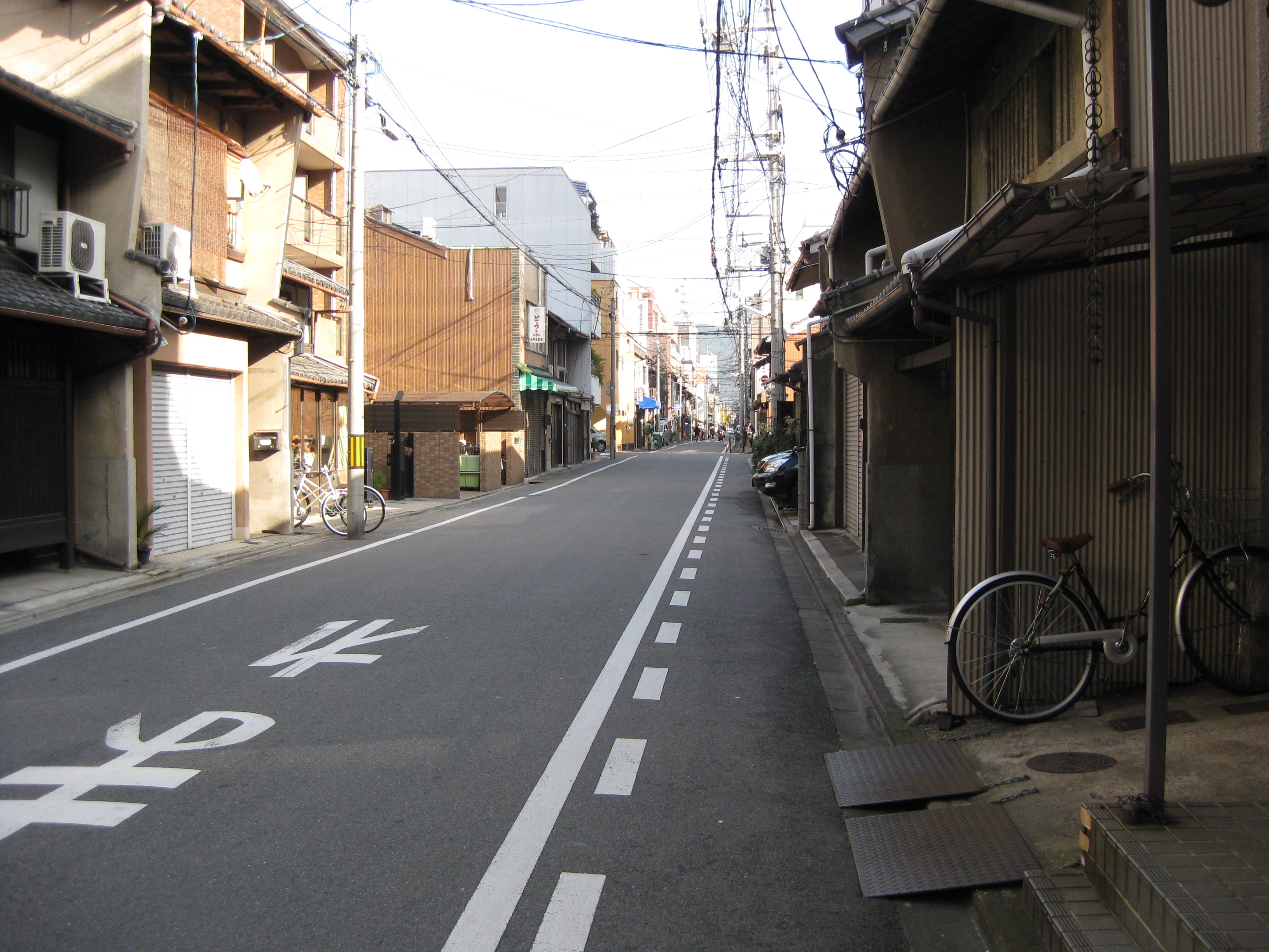 押小路通 京都市中京区 高倉通から東方面